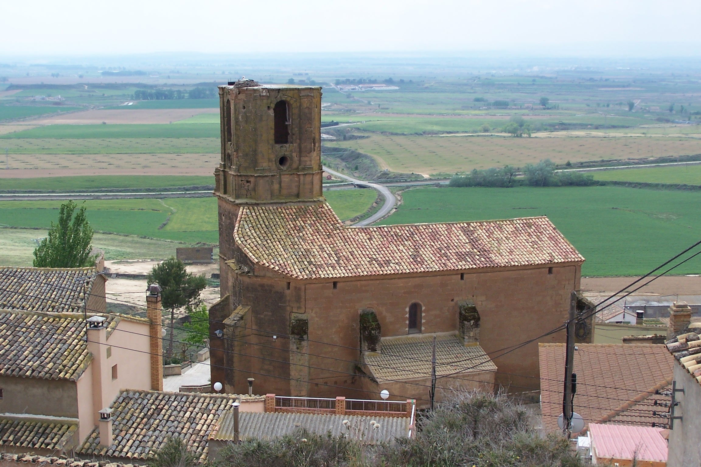 Eigen werk 22-04-2006